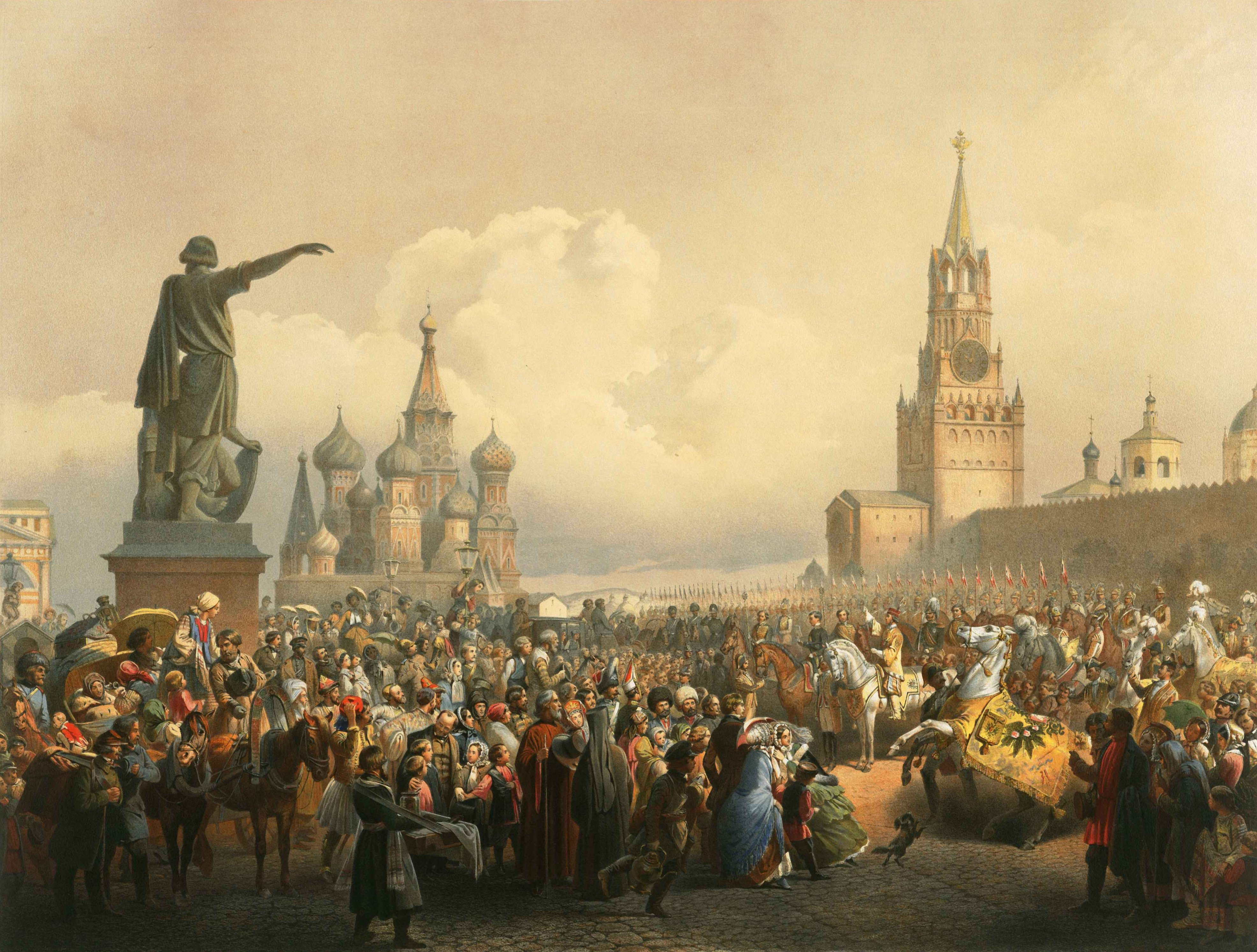 Proklamation des Krönungstages auf dem Roten Platz (Chromolithographie)